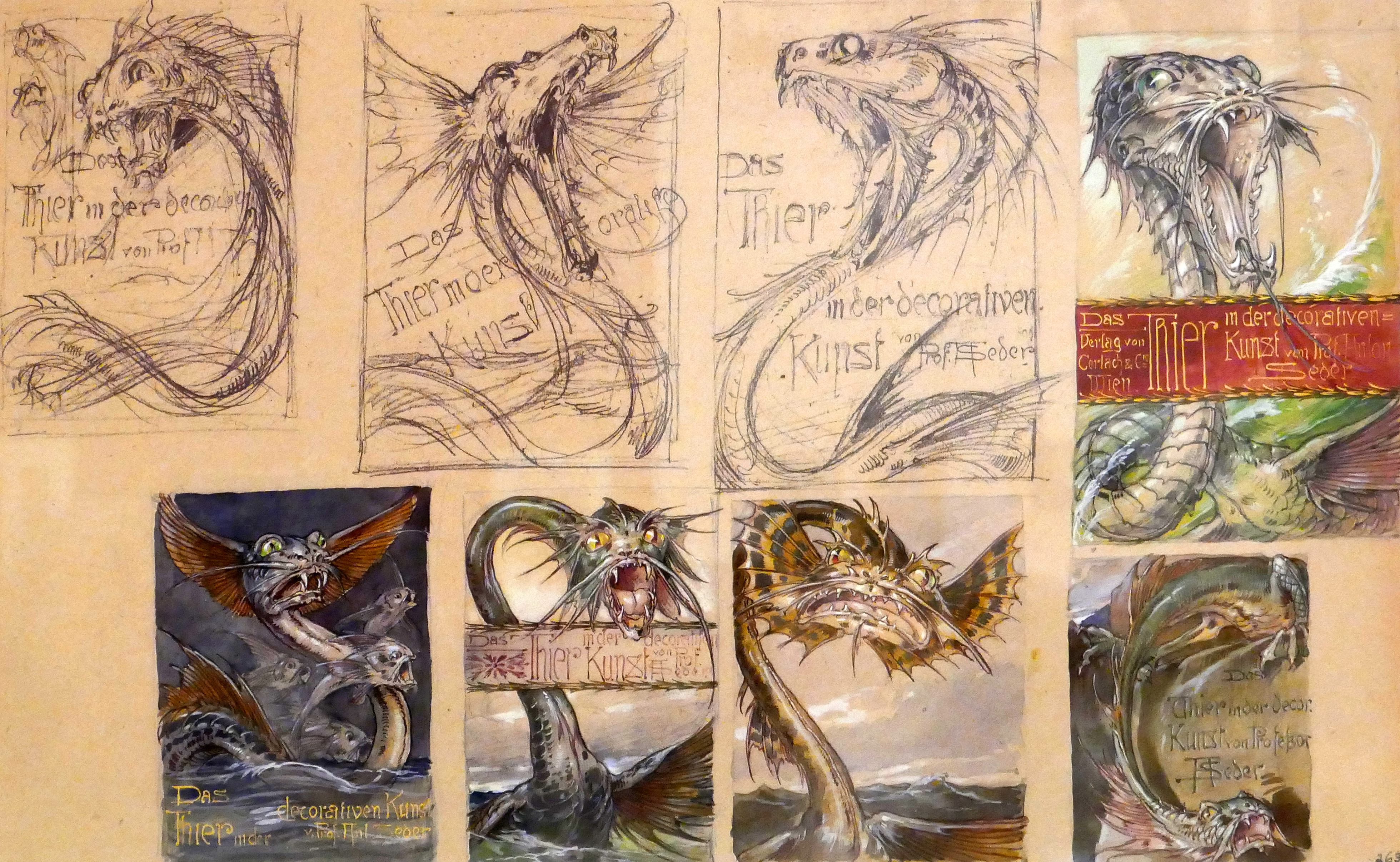 Anton Seder. Esquisse pour la couverture de Das Tier in der dec[o]rativen Kunst (L'animal dans les arts décoratifs). 1896. Mine de plomb, aquarelle, gouache sur papier gris. Exposition Laboratoire d'Europe Strasbourg, 1880-1930 au Musée d'art moderne et contemporain de Strasbourg.